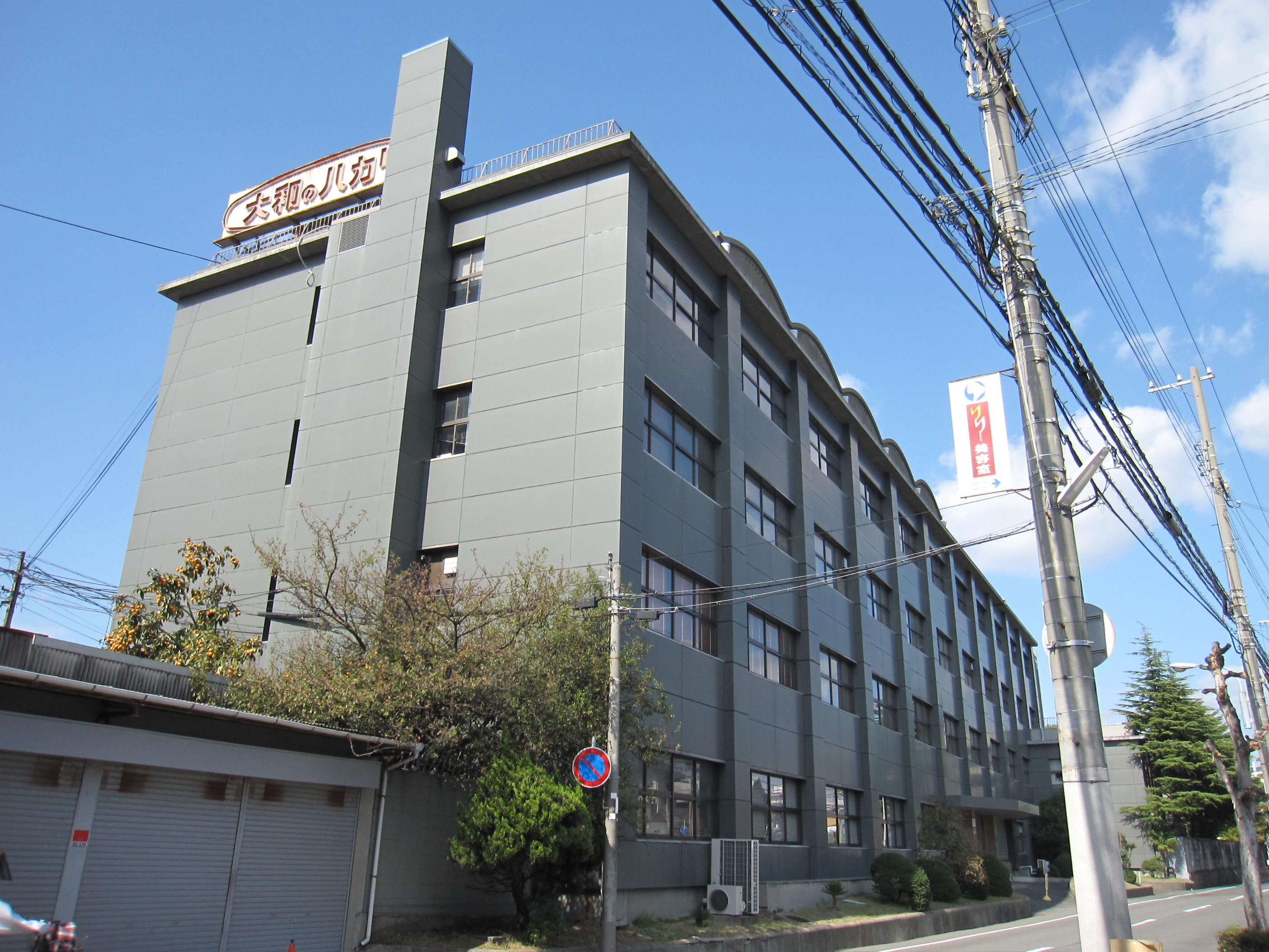 大和製衡本社